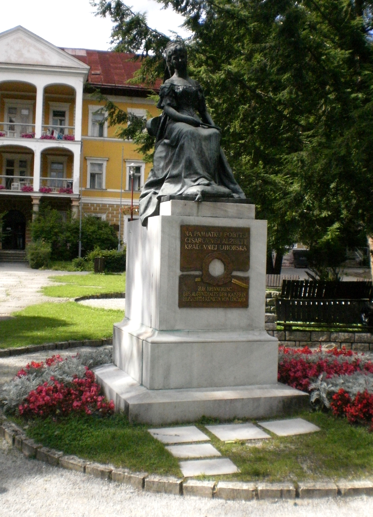 Socha - Alžbeta (Sissi) - Bardejovské kúpele Template:Cultural Heriatge Slovakia